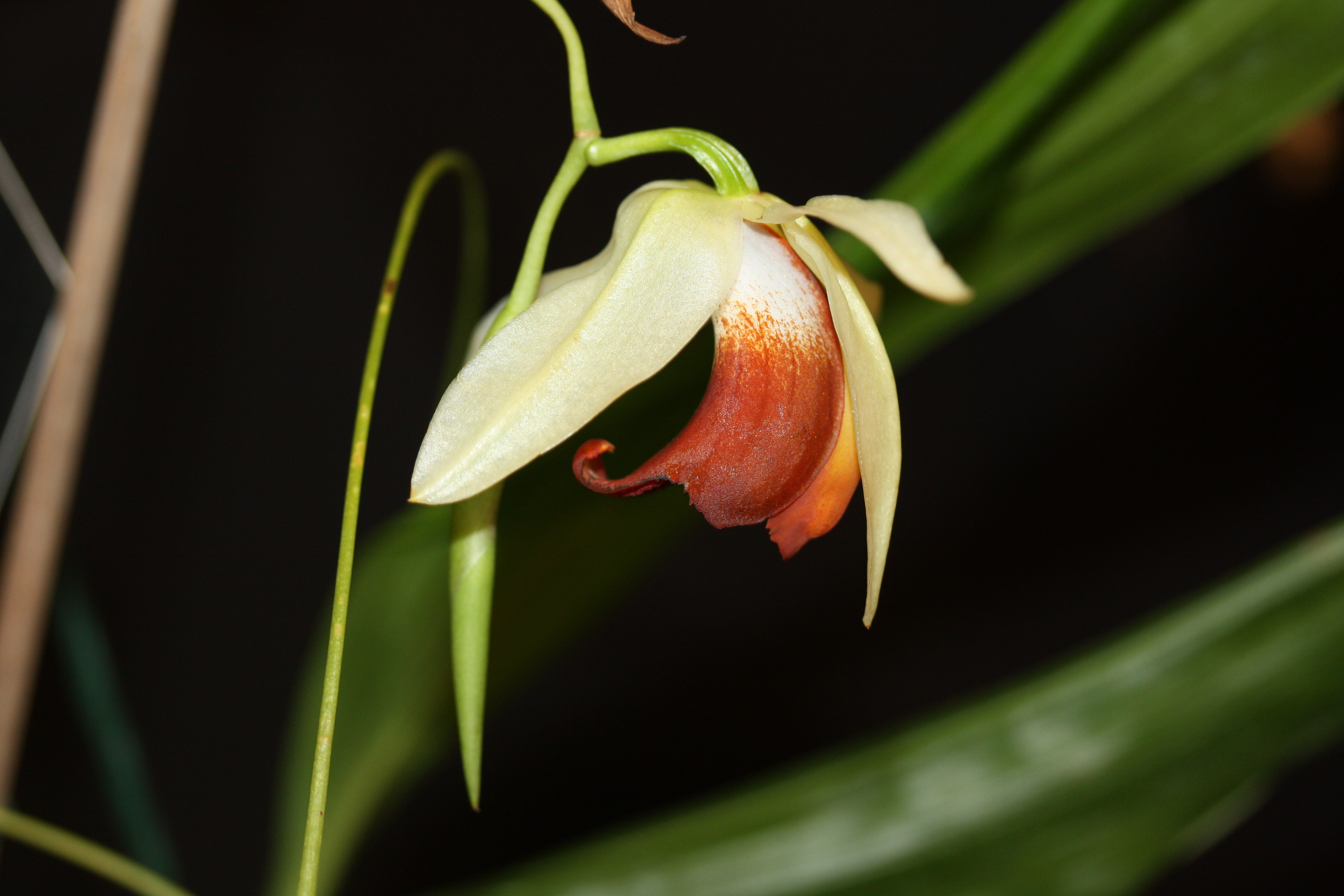 cc Licence creative commons Nicolas Picand Herba.fr